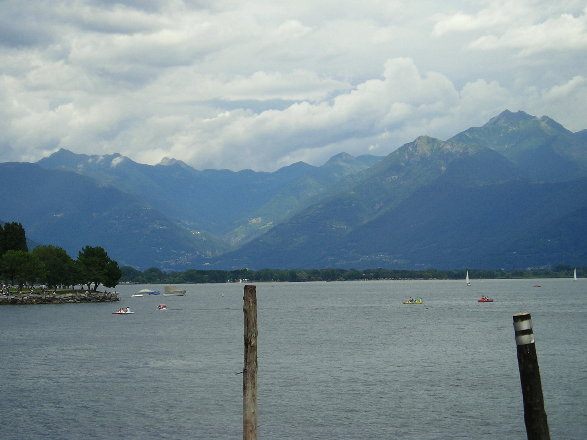 Lago Verbano ripreso da Muralto, autore Massimo Macconi, luglio 2005